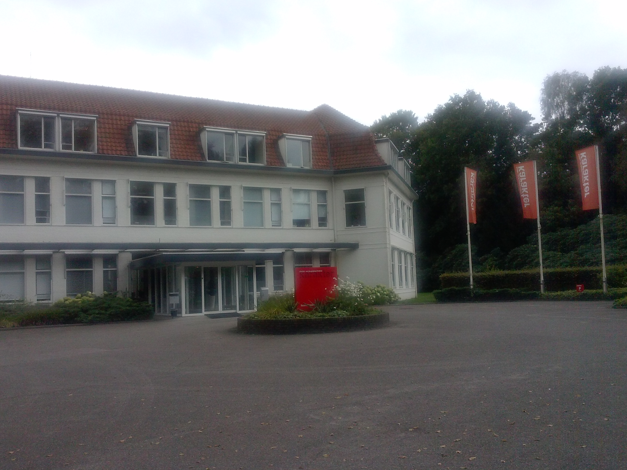 Centrum voor jeugdpsychiatrie Karakter (Voorheen Ederhorst en HORA)